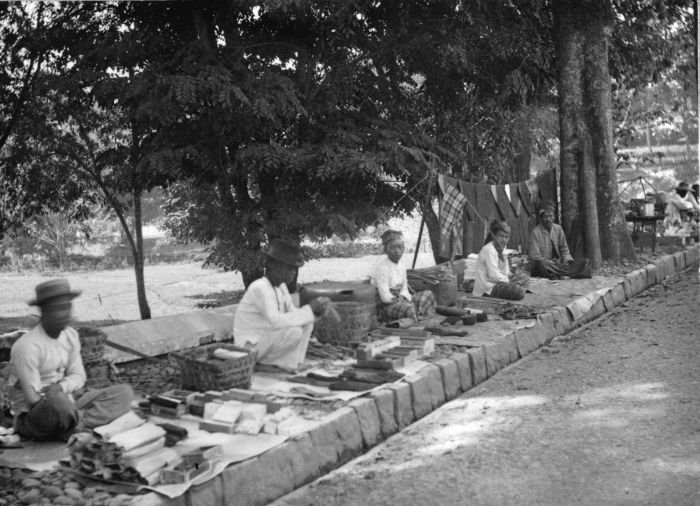 Foto. Straathandel door Chinezen en inlanders, Bandoeng.